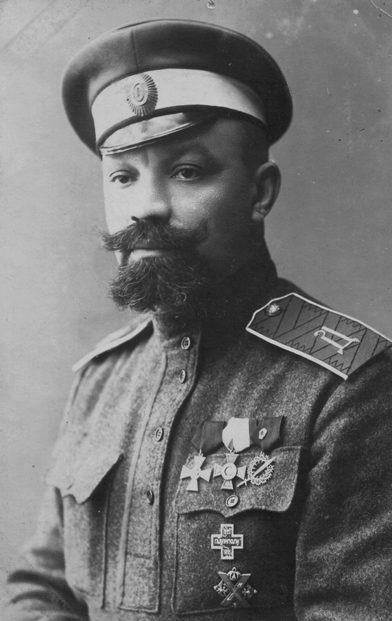 Александр Павлович Кутепов, русский генерал, герой Первой мировой войны, один из лидеров Белого движения.